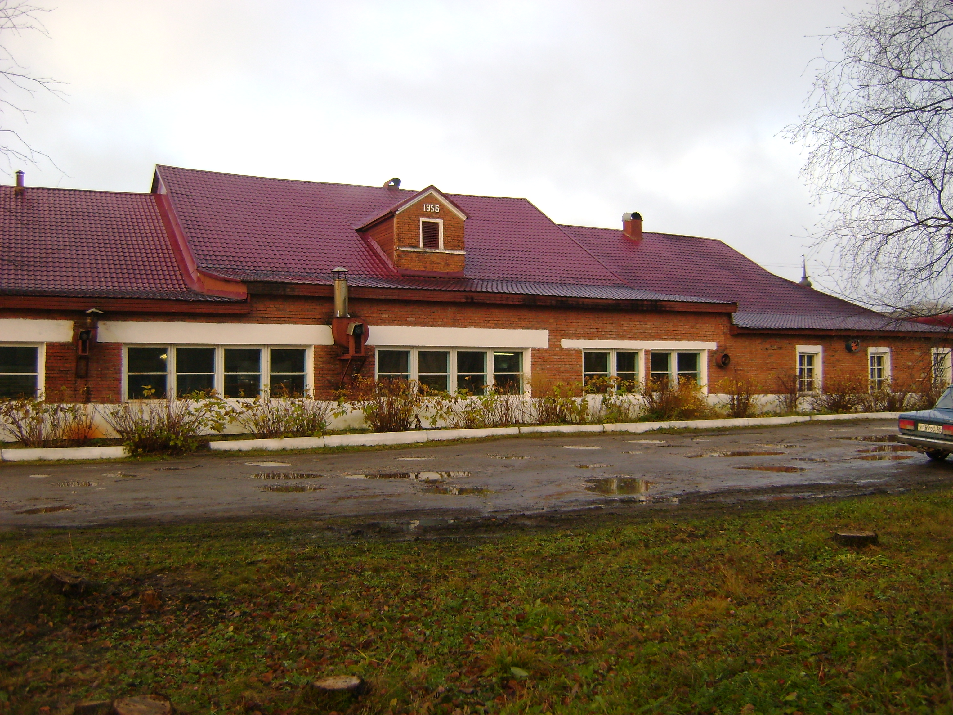 Кирилловский хлебозавод